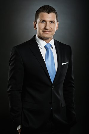 Portait von Matthias Büttner